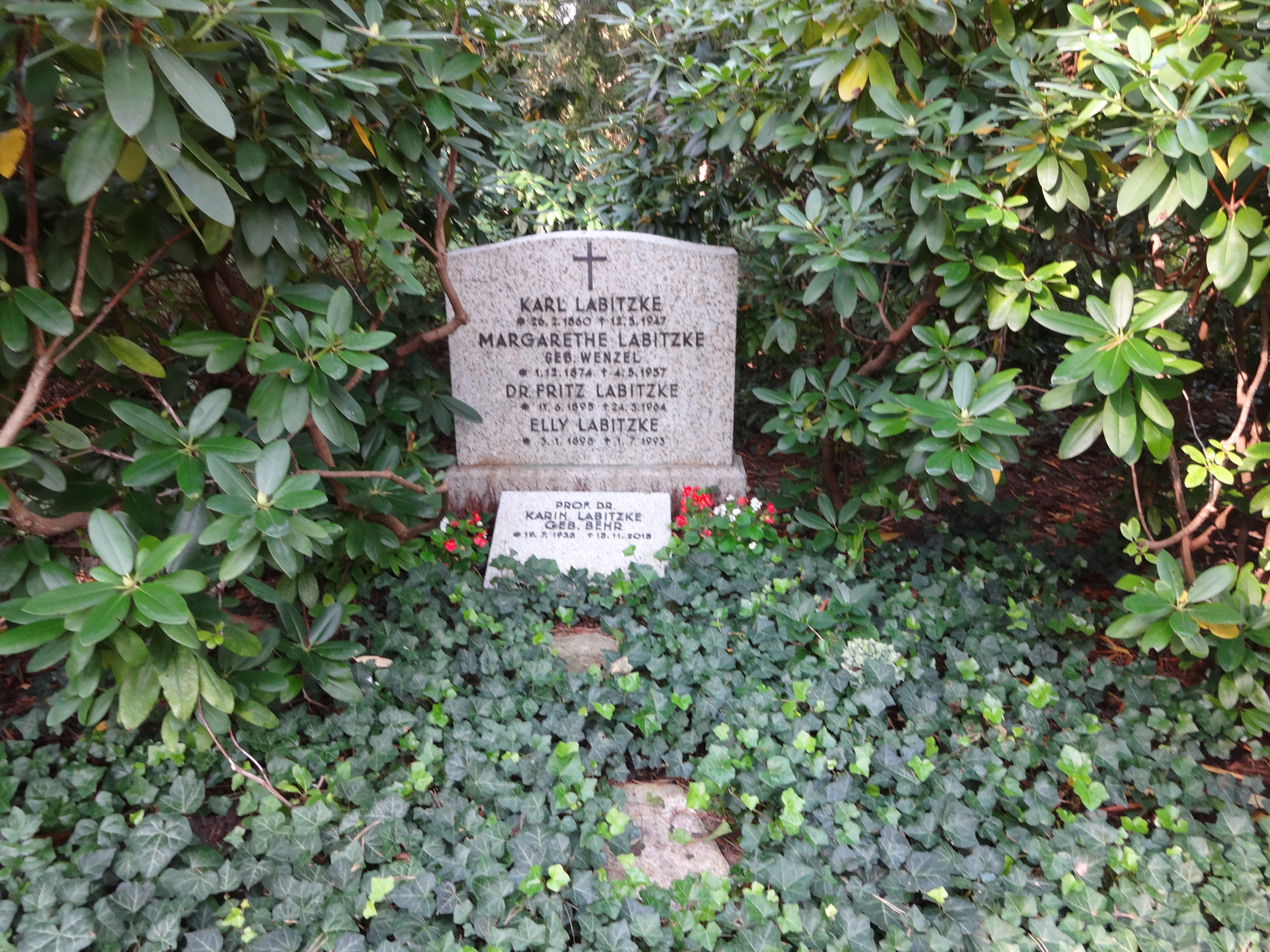 Grab von Prof. Karin Labitzke auf dem Waldfriedhof Dahlem in Berlin